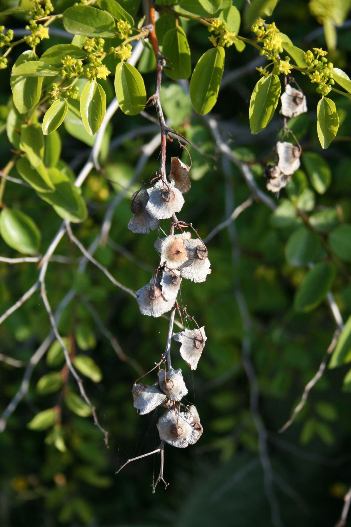 Christusdorn (Paliurus spina-christi), Kreuzdorngewächse (Rhamnaceae) - Italien/Italia/Italy: Apulien/Puglia, Prov. Foggia, südöstlich unter Rignano Garganico